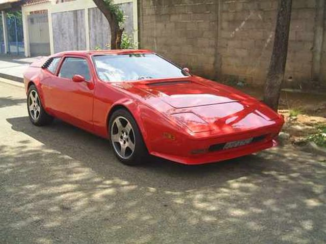 Brazilian car Miura, 1977 File:[1